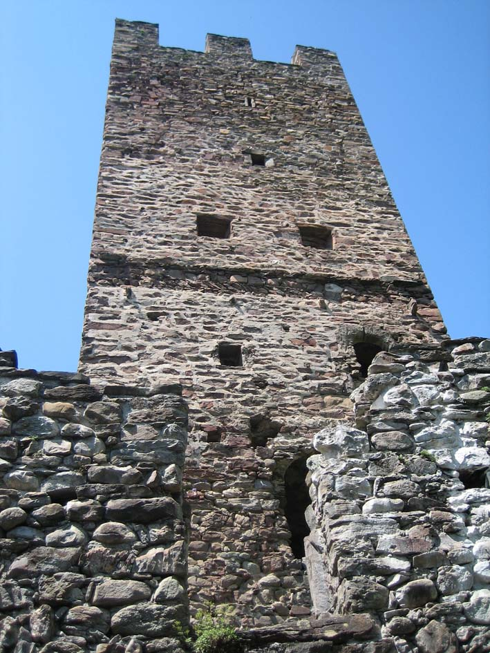 Turm von Westen